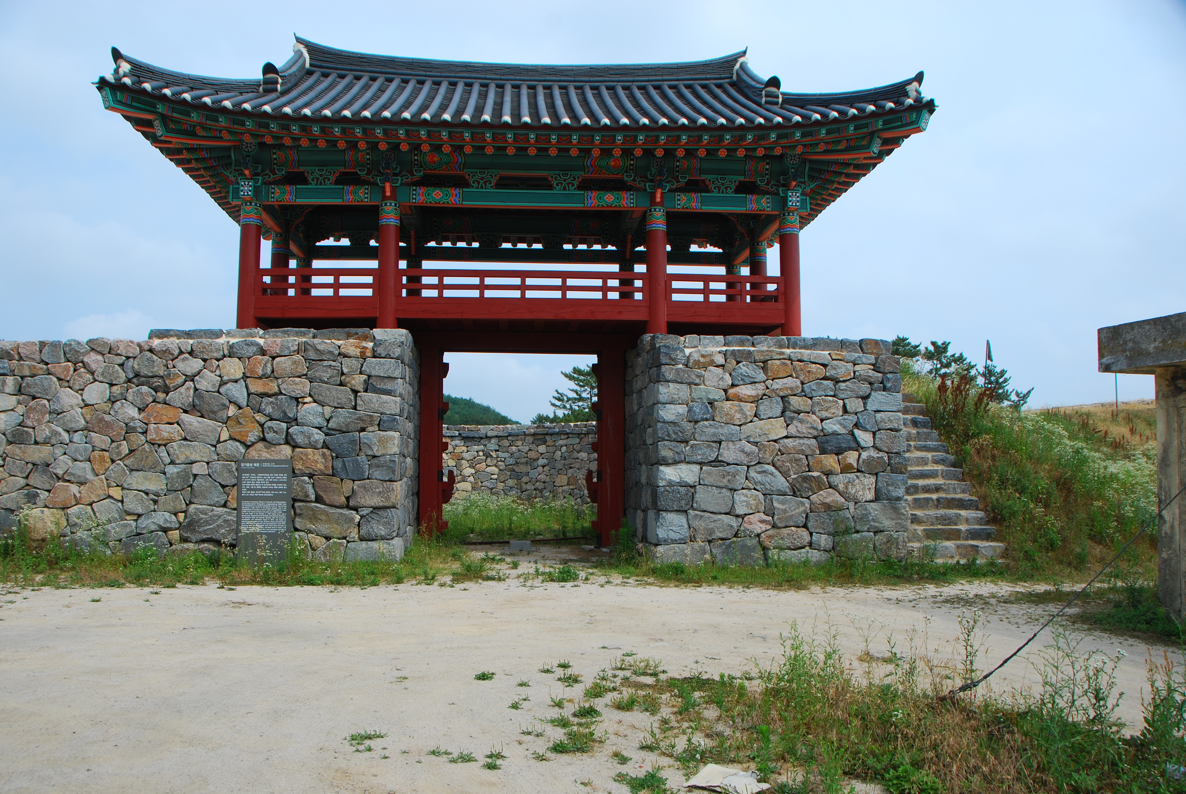 복원된 장기읍성 북문